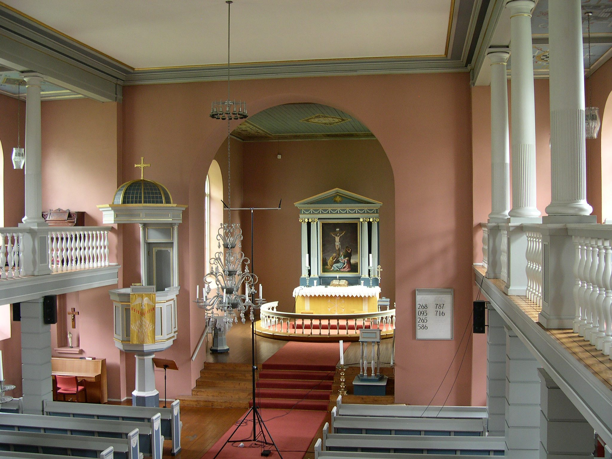 Interiør i Haug kirke, Hokksund. Foto: Oddbjørn Sørmoen, fra Kulturminnebilder.no.